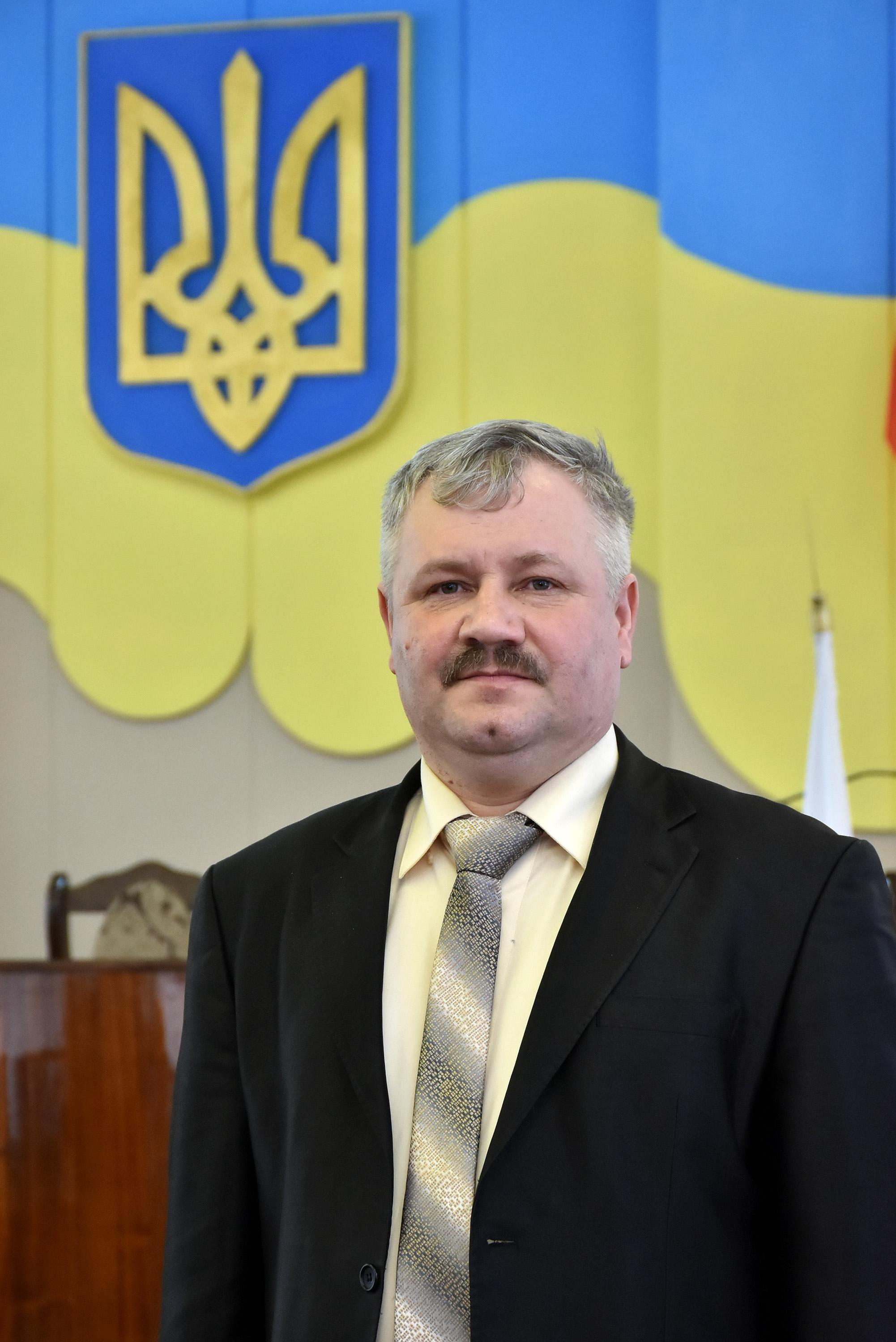 Український громадсько-політичний діяч, голова Кременецької районної ради Володимир Стефанський.